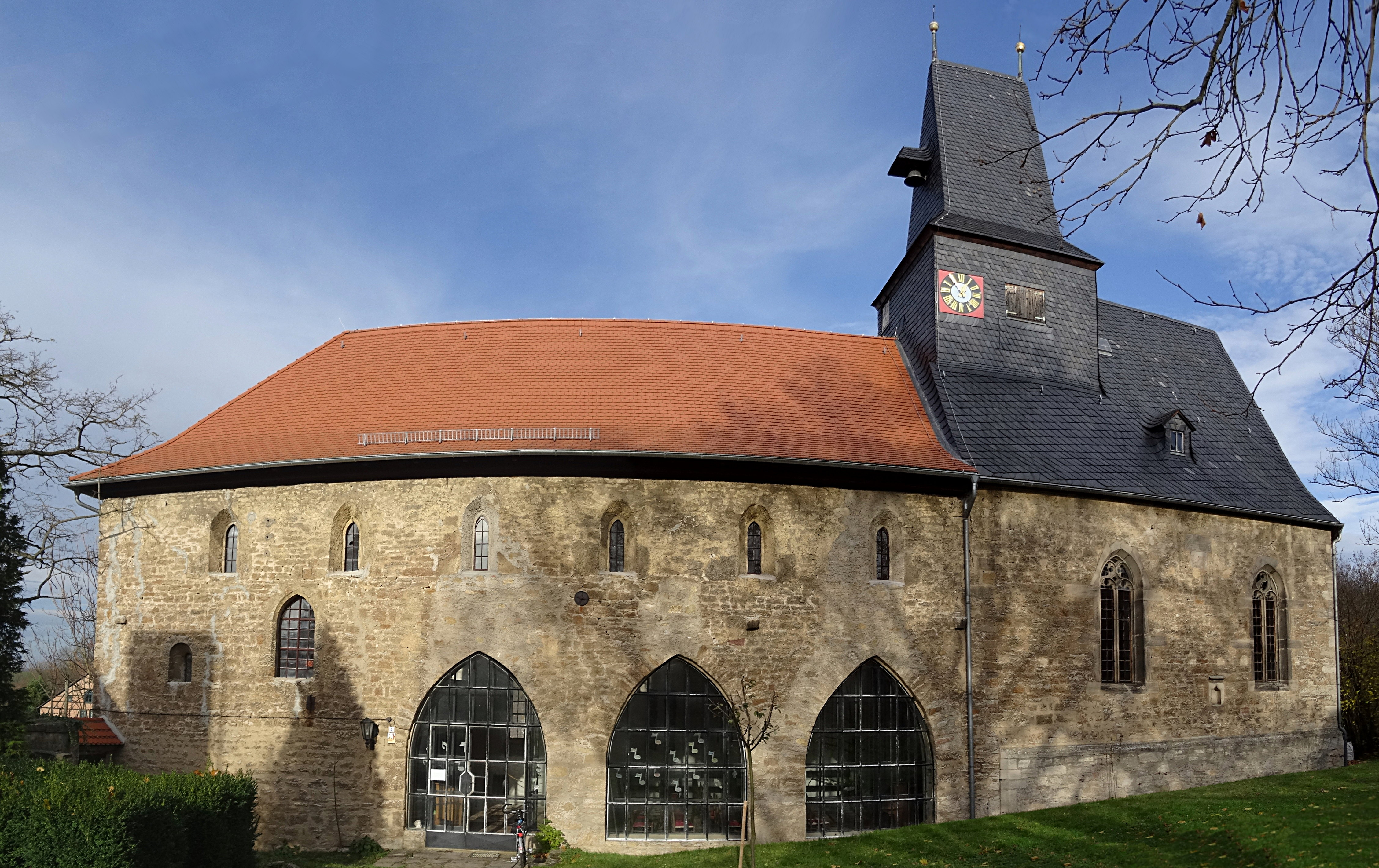 St. Maria und Bartholomäus in Kapellendorf, eine der ältesten bekannten Kirchen Thüringens. Die großen Rundbogenfenster sind Reste eines Seitenschiffes (von 1235 bis 1577).